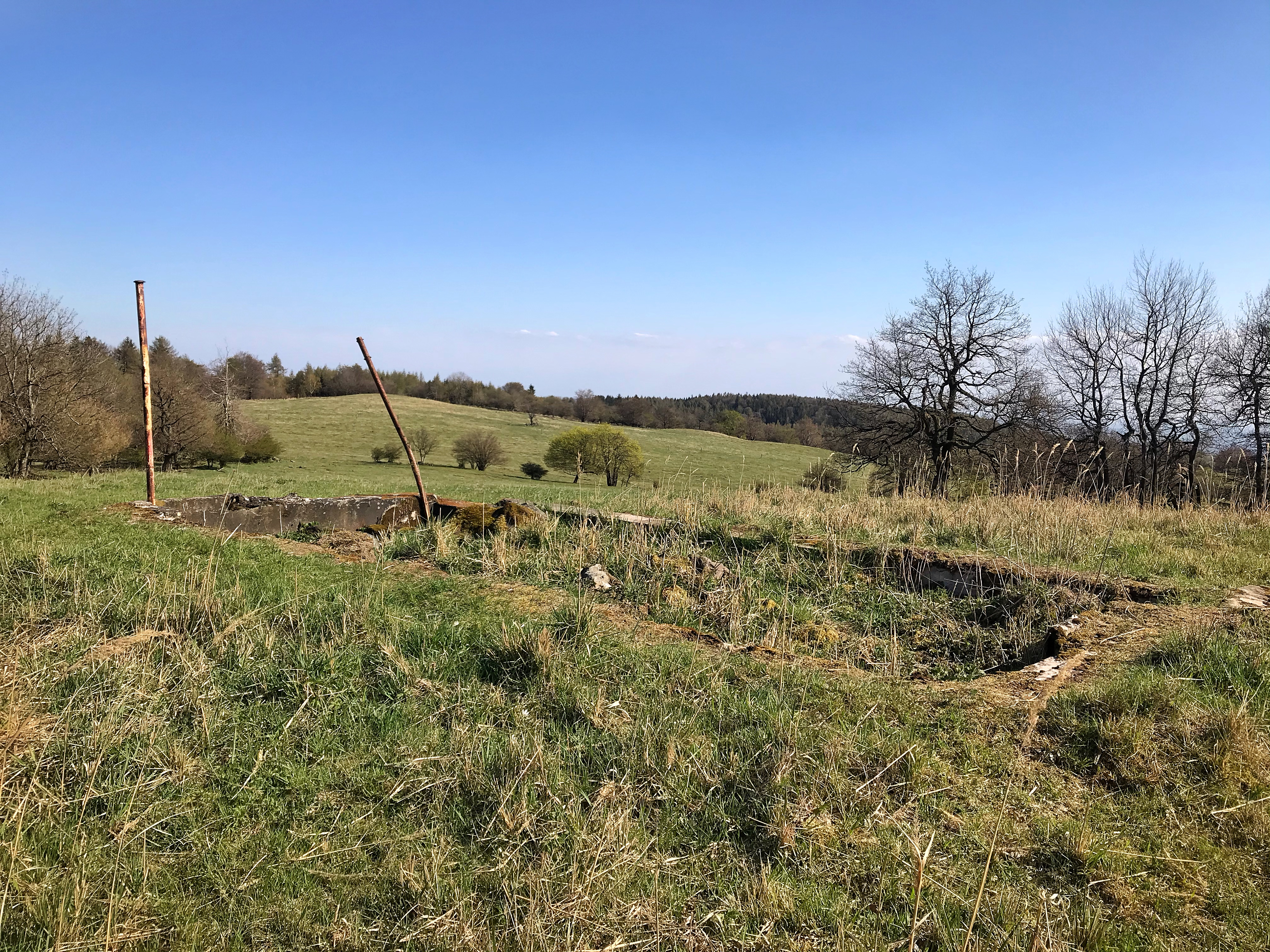 Vrchol hory Vrchovina (677 m) v Českém středohoří